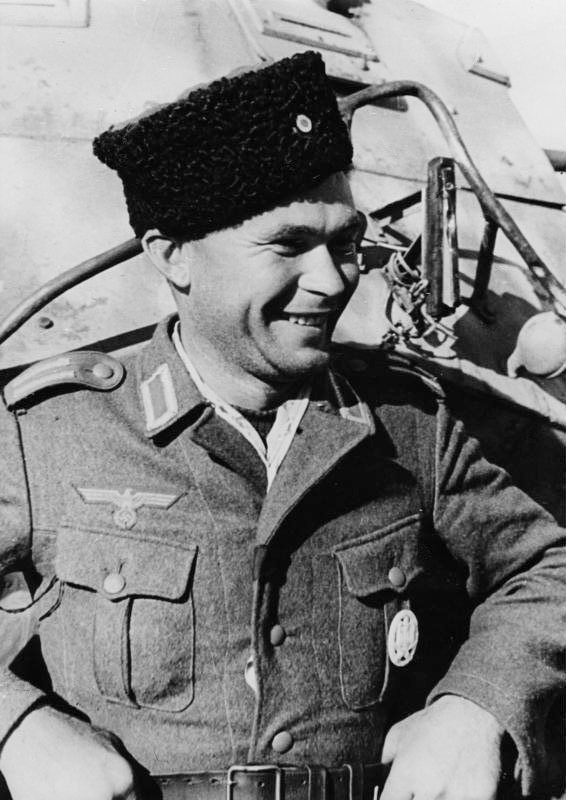 Treu der Kosaken-Tradition Oberfeldwebel Nicolas Balanowski, kämpft wie viele seiner Landsleute, in den Reihen der landeseigenen Verbände gegen seine früheren Unterdrücker, den Bolschewisten. Getreu der alten Kosakentradition, trägt er noch immer die Kosaken-Mütze.